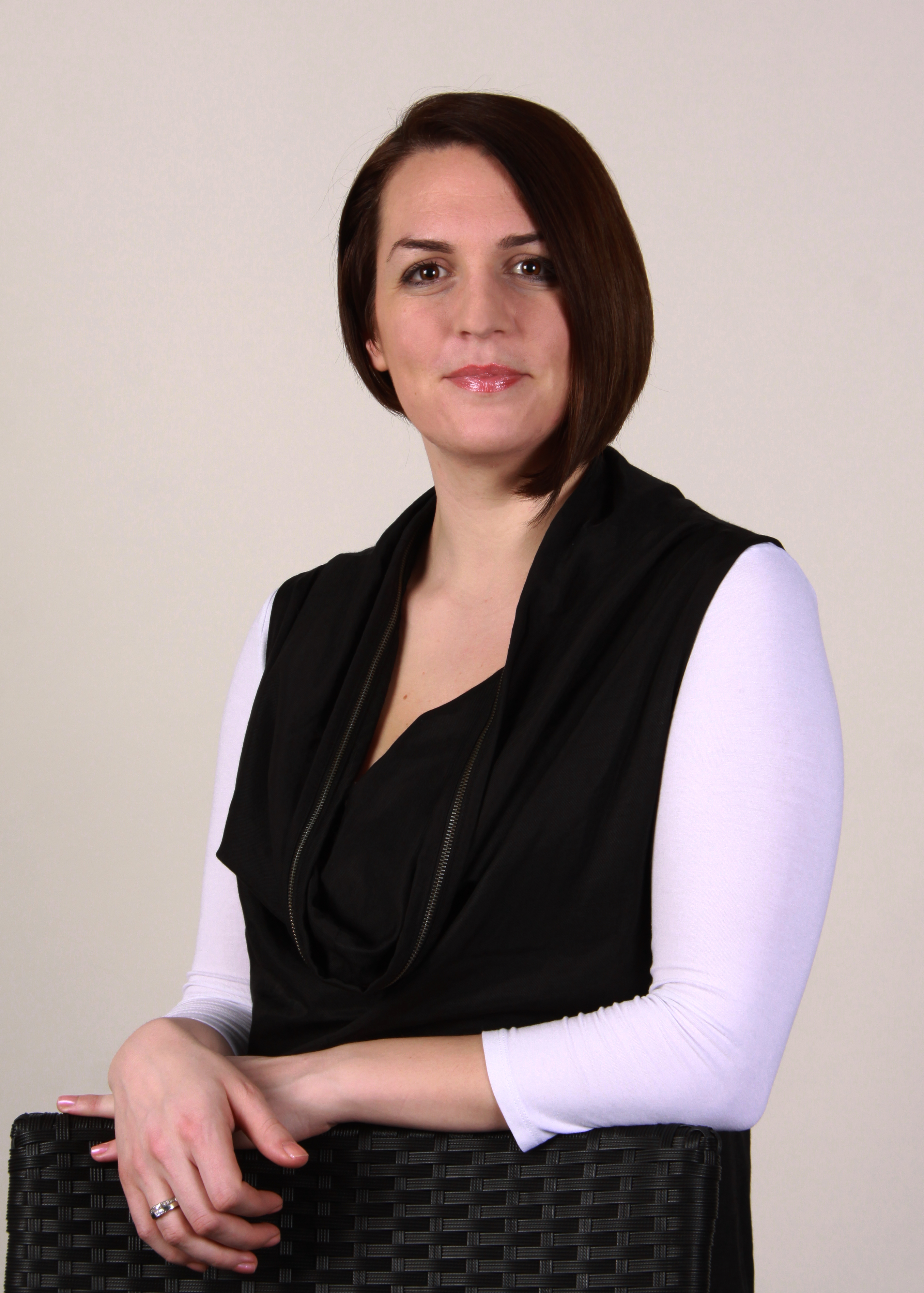 Abgeordnete/r Europaparlament